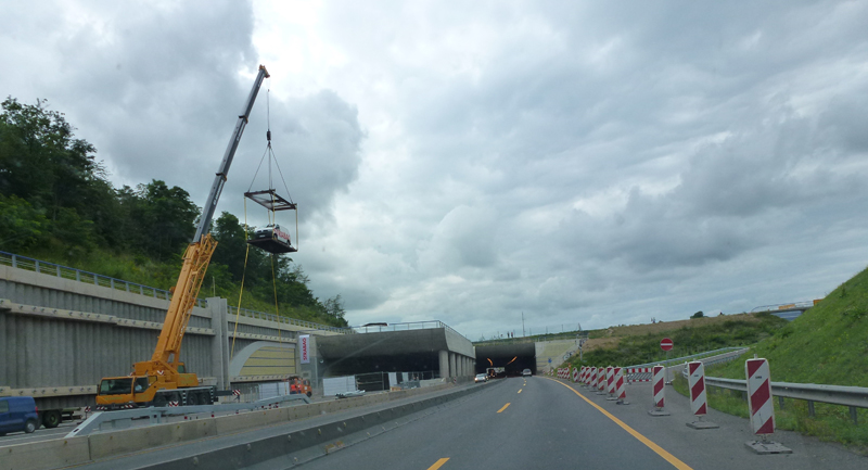 Einfahrt in den Mainzer Tunnel an der Anschlussstelle Hechtsheim-Ost, zu erkennen ist auch die Abfahrt von der Autobahn. Die Aufnahme entstand am "Tunneltag". Ein Kran hievte einen Transporter auf die ursprüngliche Höhe der alten Autobahn um den Niveauunterschied deutlich zu machen.